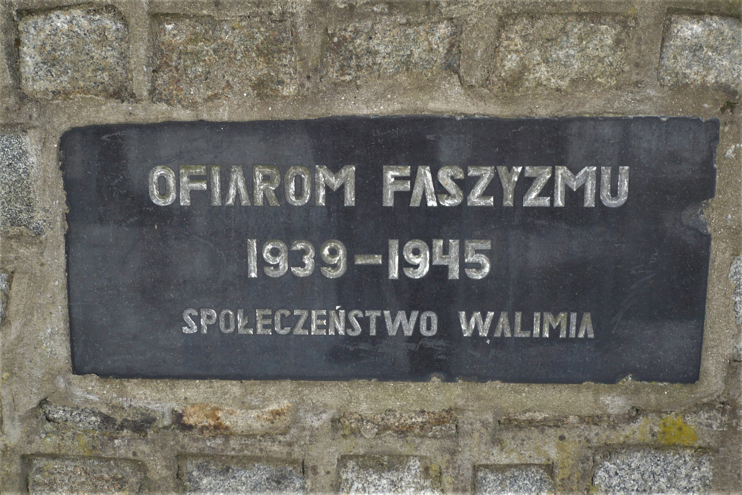 Walim. Cmentarz